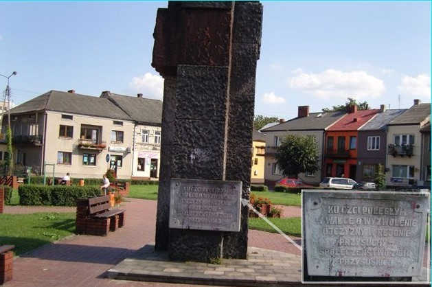 Pomnik ku czci żołnierzy który zgineli w okolicach Przysuchy